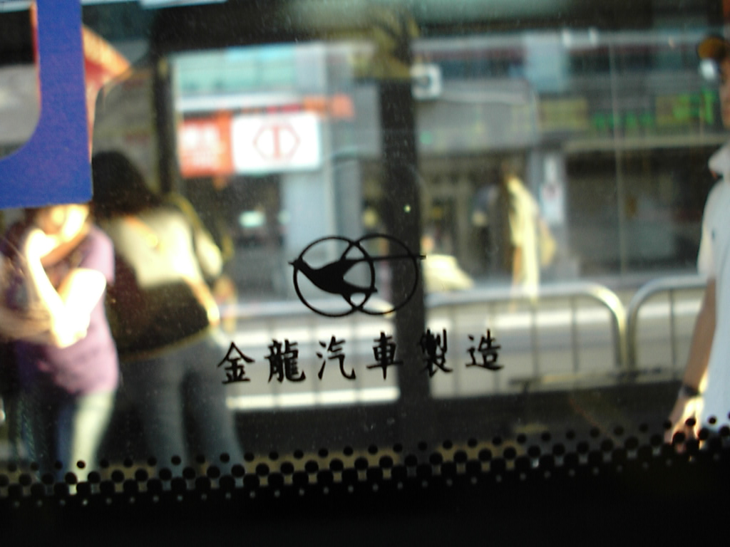 指南汽車客運股份有限公司車輛的車窗，標示集團關係企業金龍汽車製造字樣。